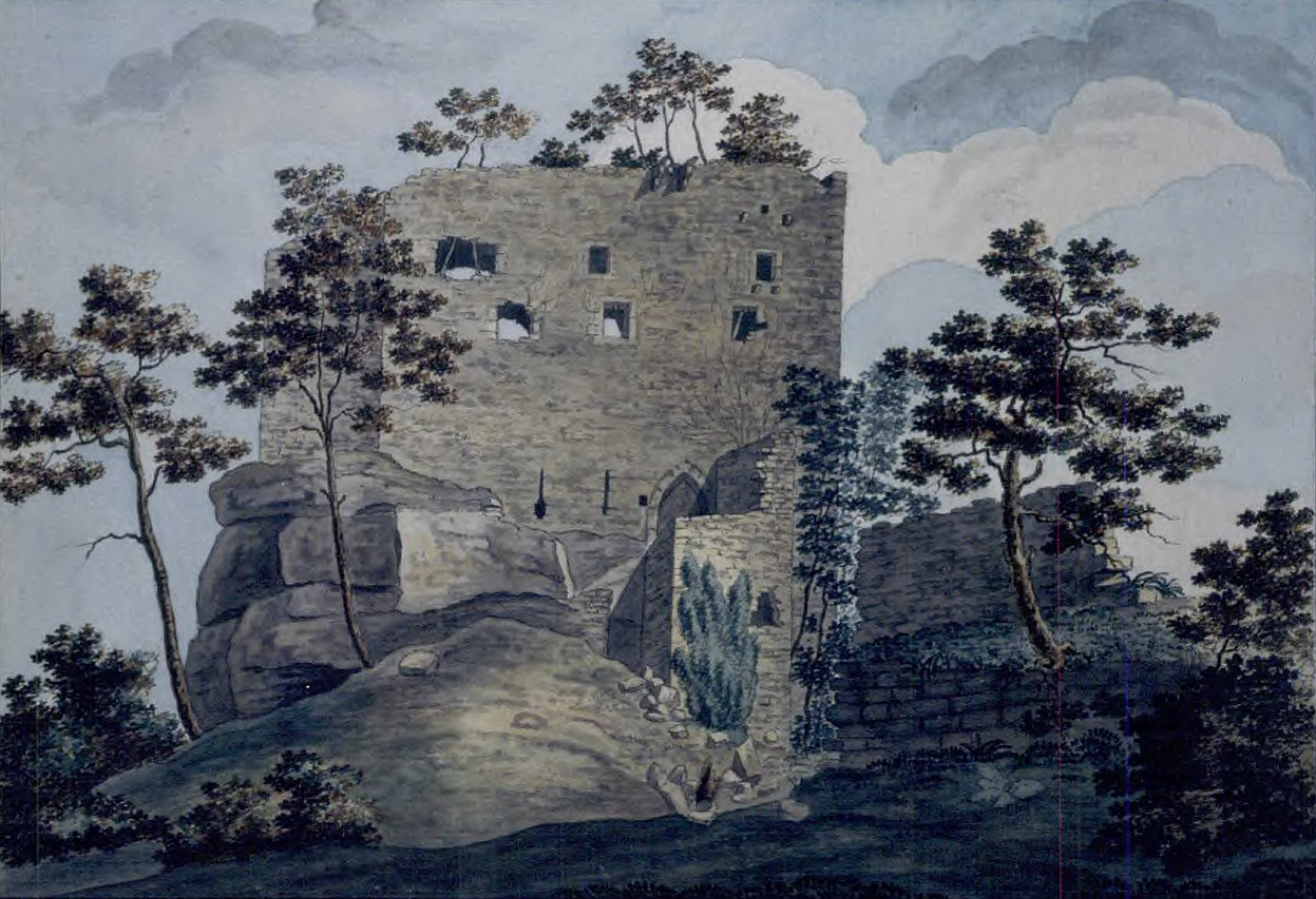 Darstellung der Burgruine Birkenfels im Elsass